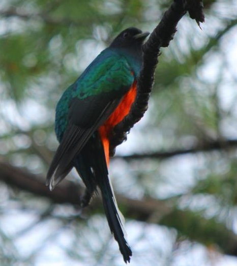 Foto: Karina Avila Photo: Karina Avila